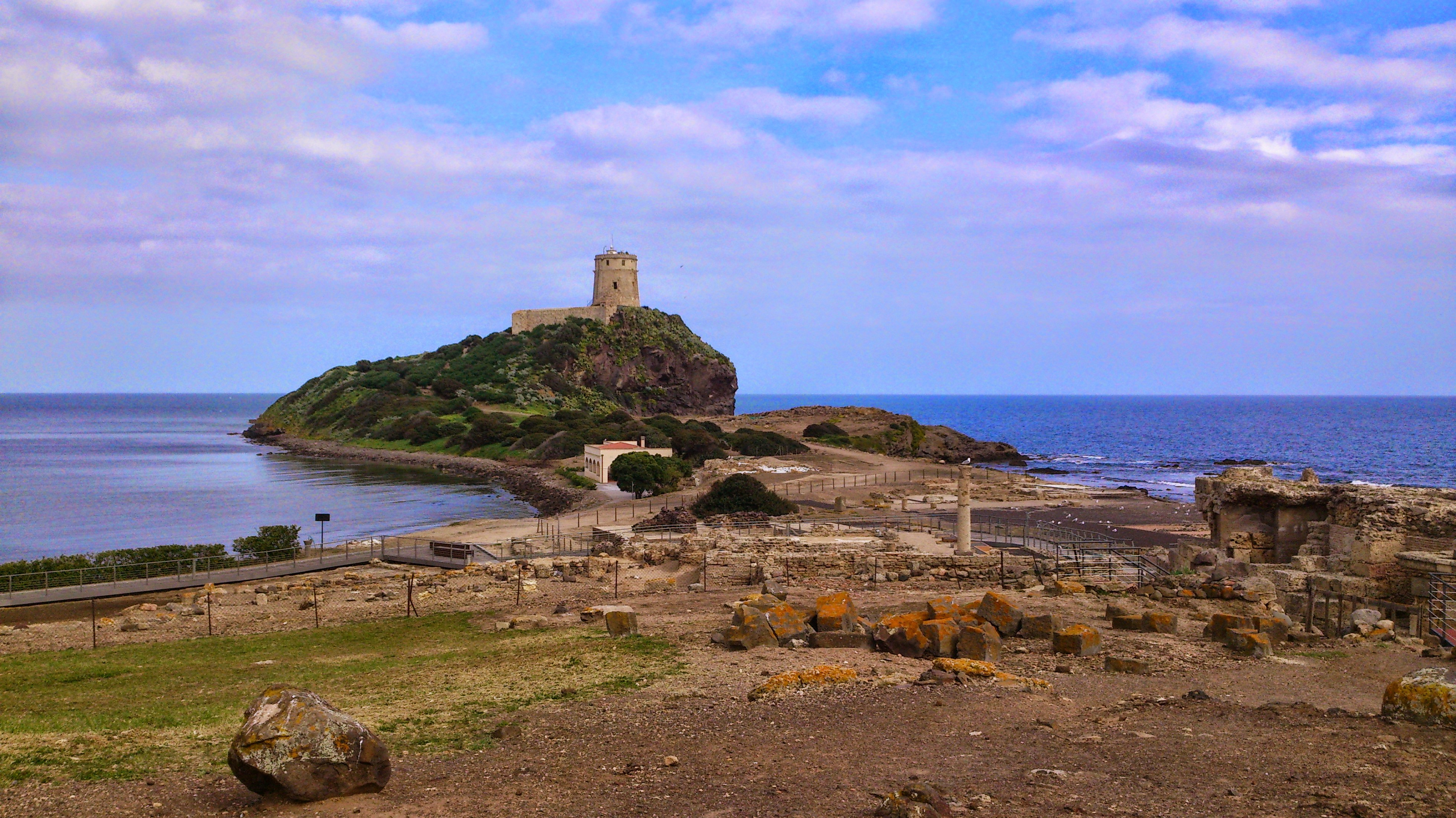 Area archeologica di Nora This is a photo of a monument which is part of cultural heritage of Italy.